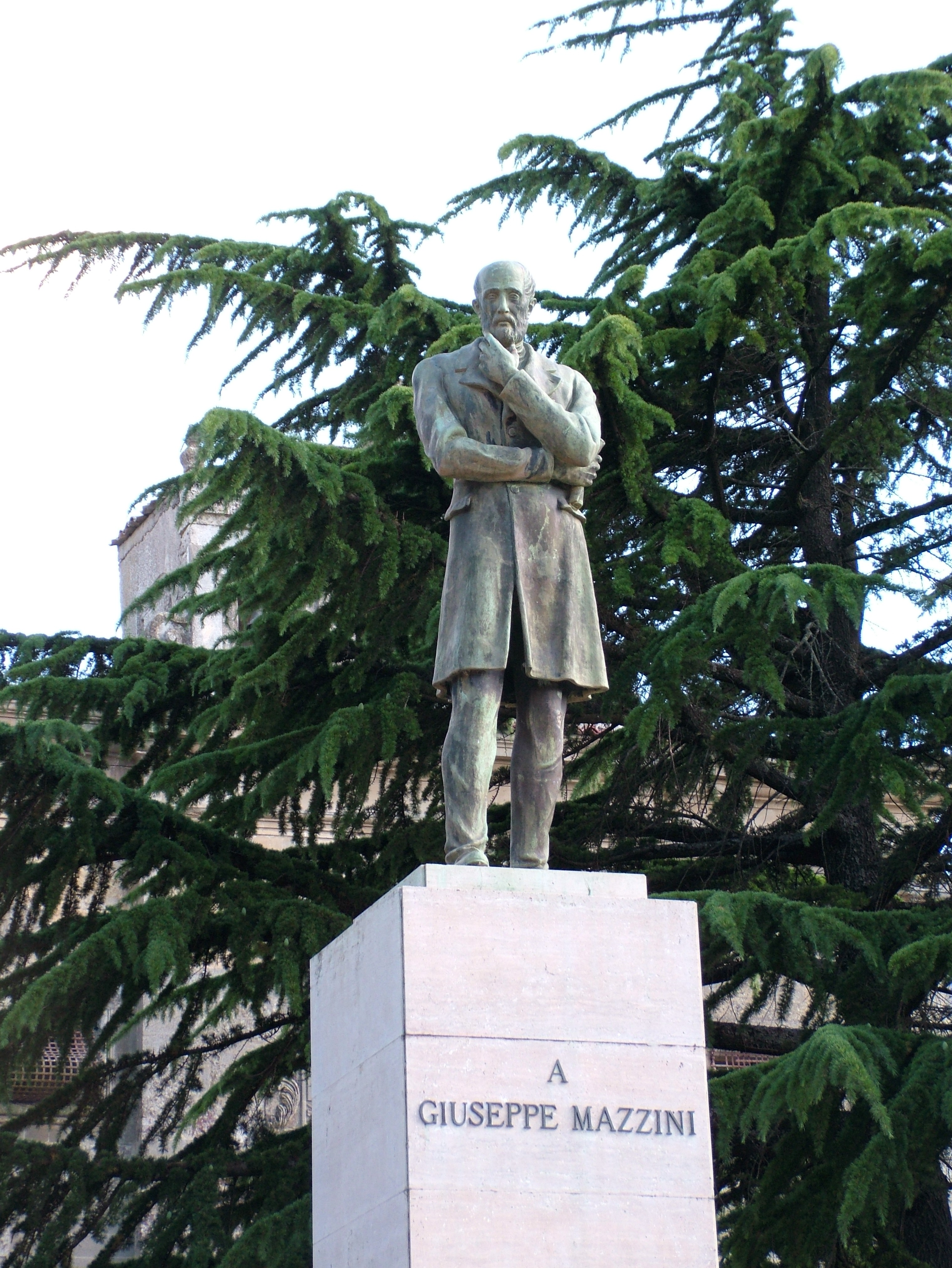 Enna, Sizilien, das Denkmal Giuseppe Mazzini